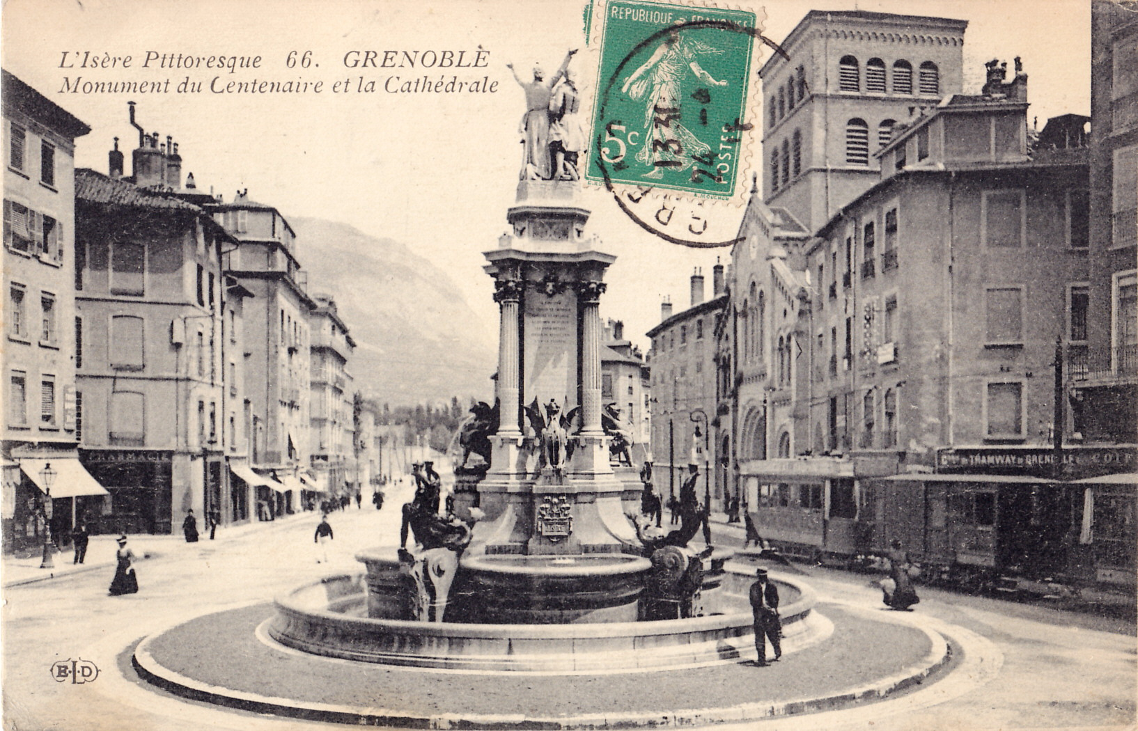 Carte postale ancienne éditée par ELD, n°66 :GRENOBLE - Monument du Centenaire et la Cathédrale